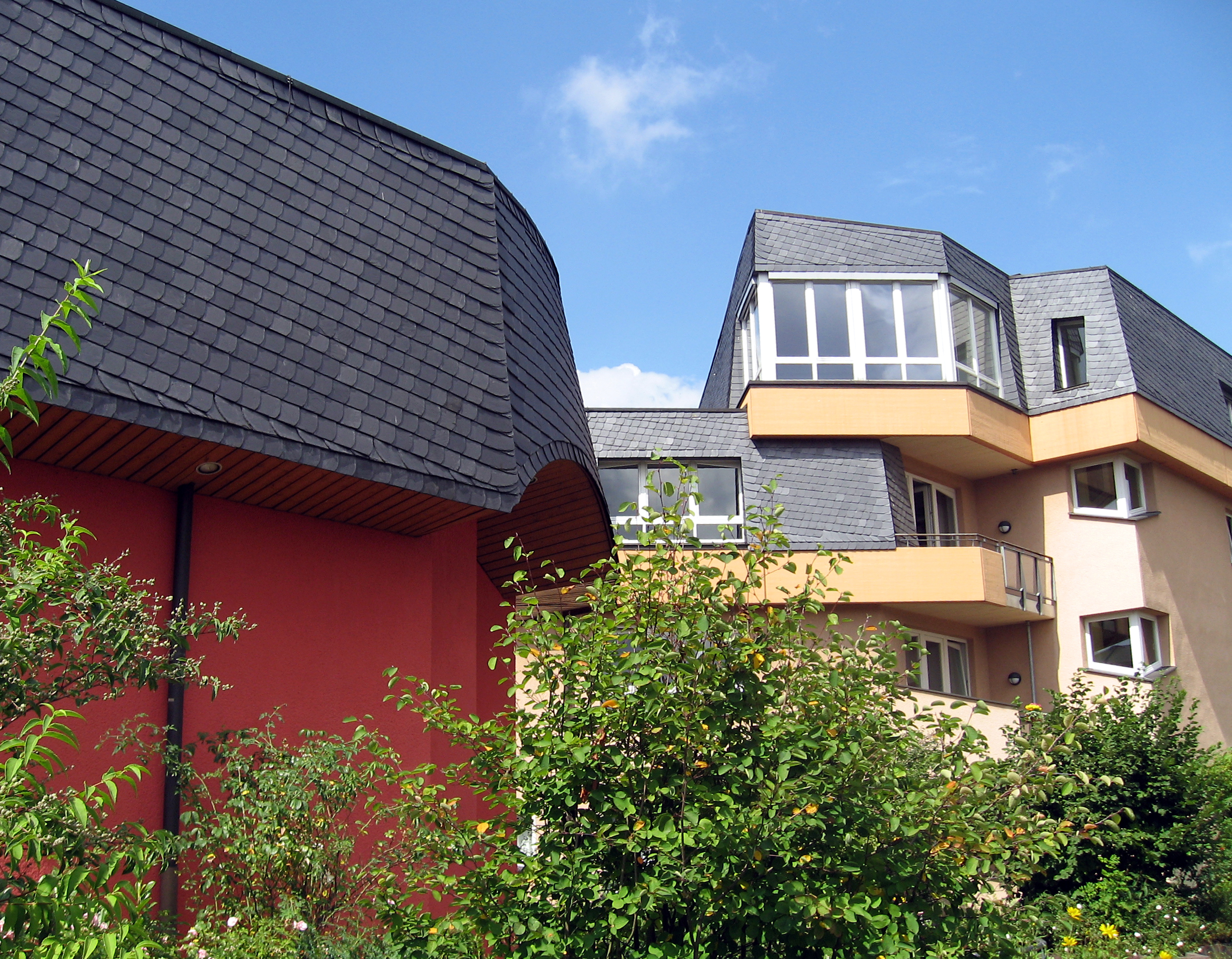 Dortmund, Brünninghausen, Anthroposophen, Architektur